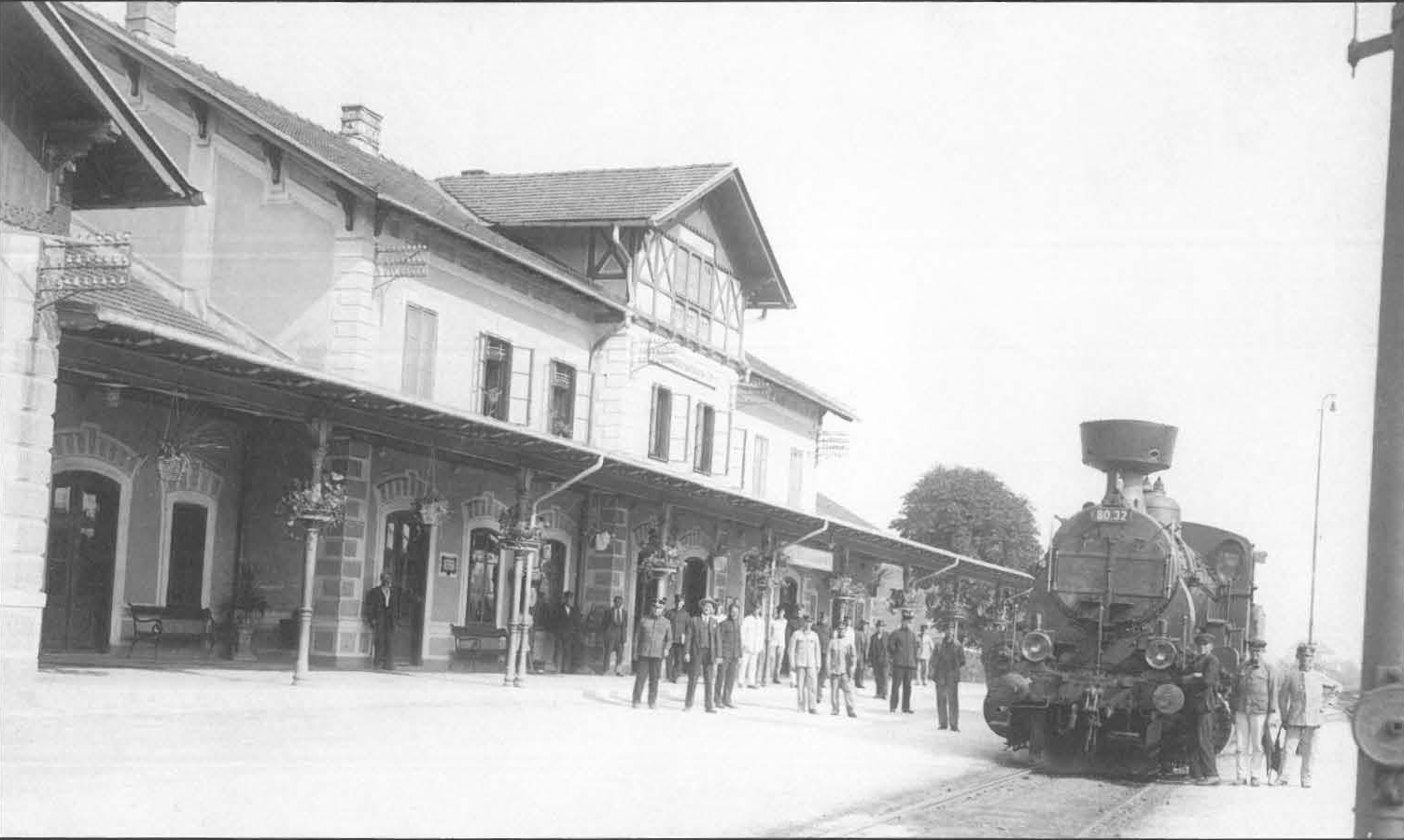 Gorenjski kolodvor v Šiški 1927